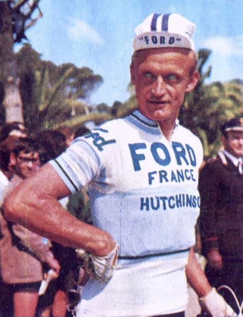 CAMPIONI DELLO SPORT 1966/67 - Figurina/Sticker n. 254 - J. GRACZYCK